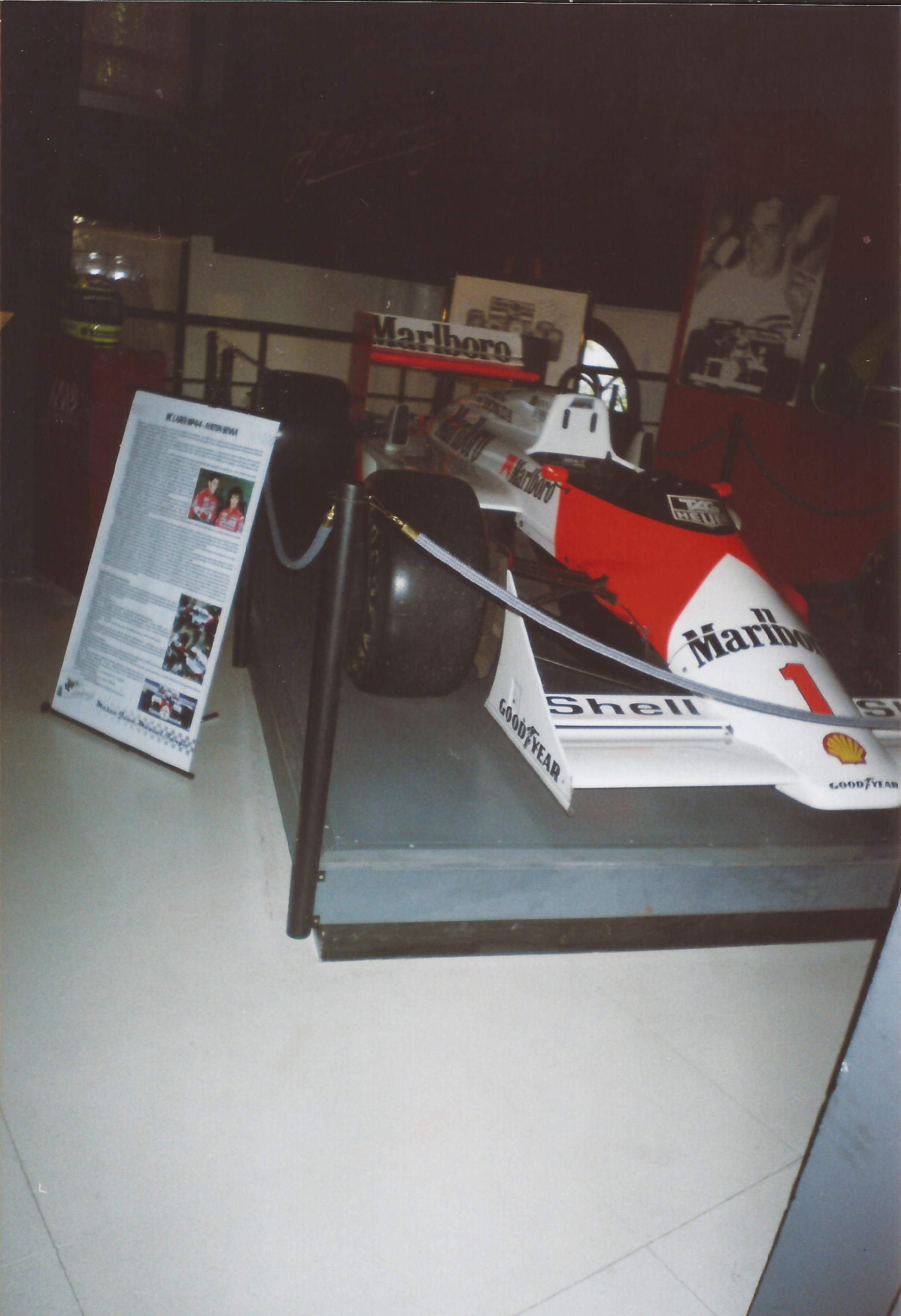 Museo Fangio, Argentina